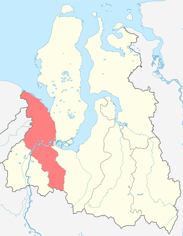 Район на карте Ямало-Ненецкого автономного округа